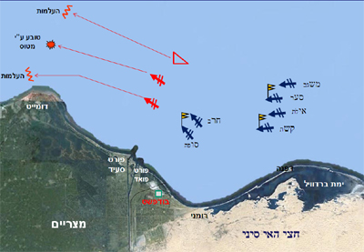 תרשים קרב פורט סעיד 7 באוקטובר 1973